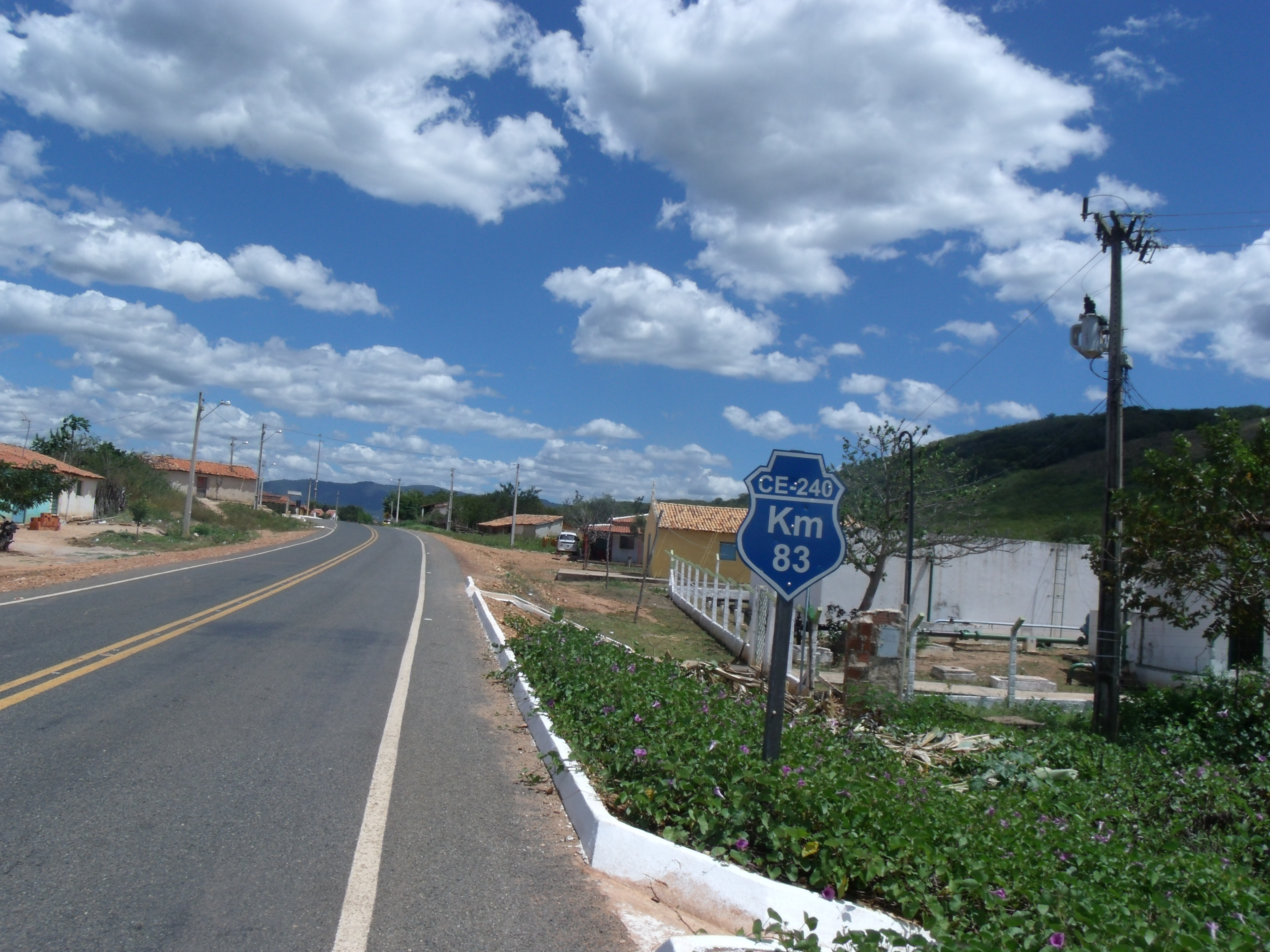 Vista do povoado Boqueirão em Coreaú, na margem da rodovia CE 240.